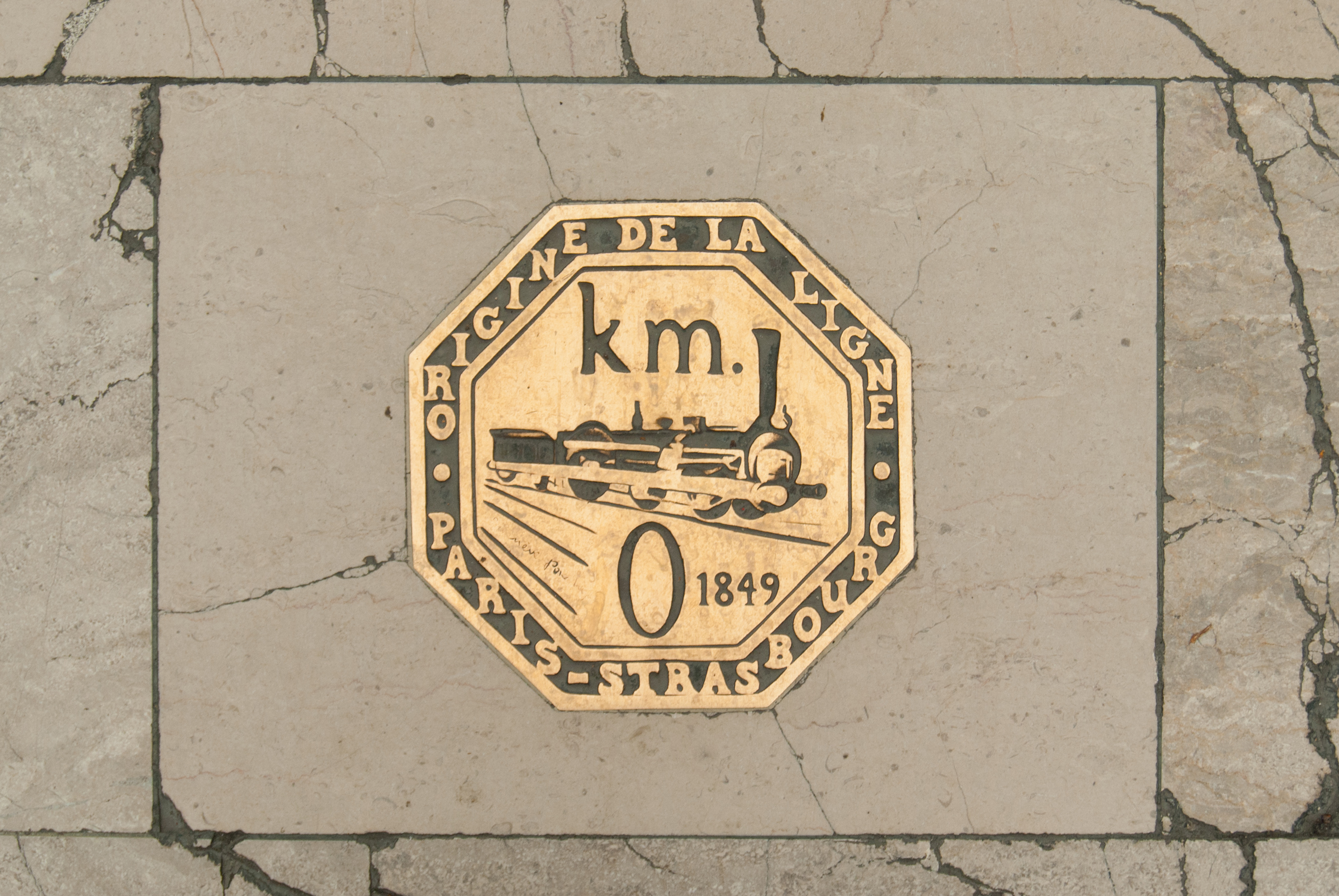 Zero kilometre mark in Gare de Paris-Est, Paris, France.